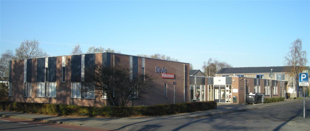 Wijkcentrum De As in woonwijk De Greiden in Heerenveen